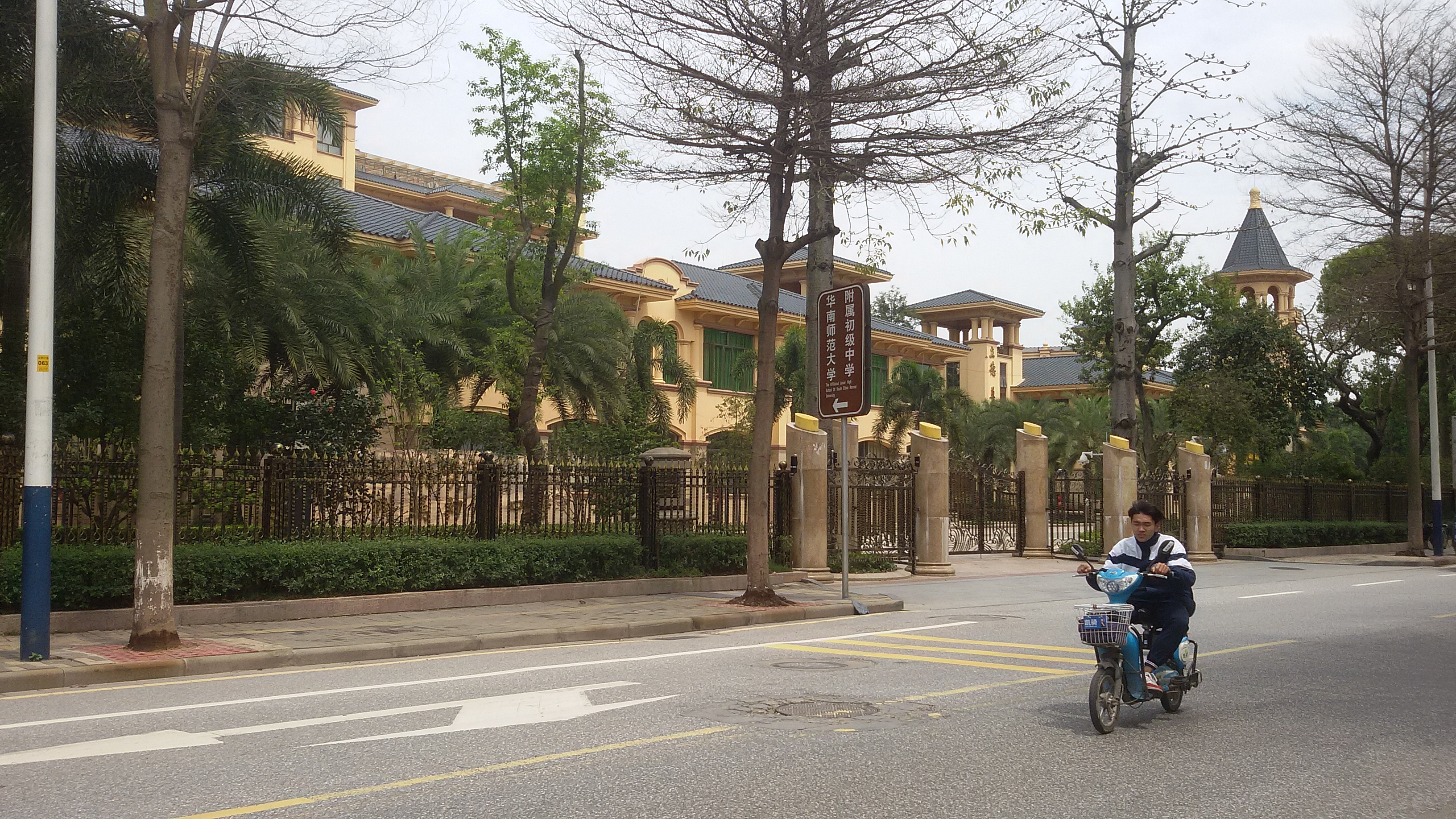 粵語: 華南師範大學附屬初級中學嘅正門